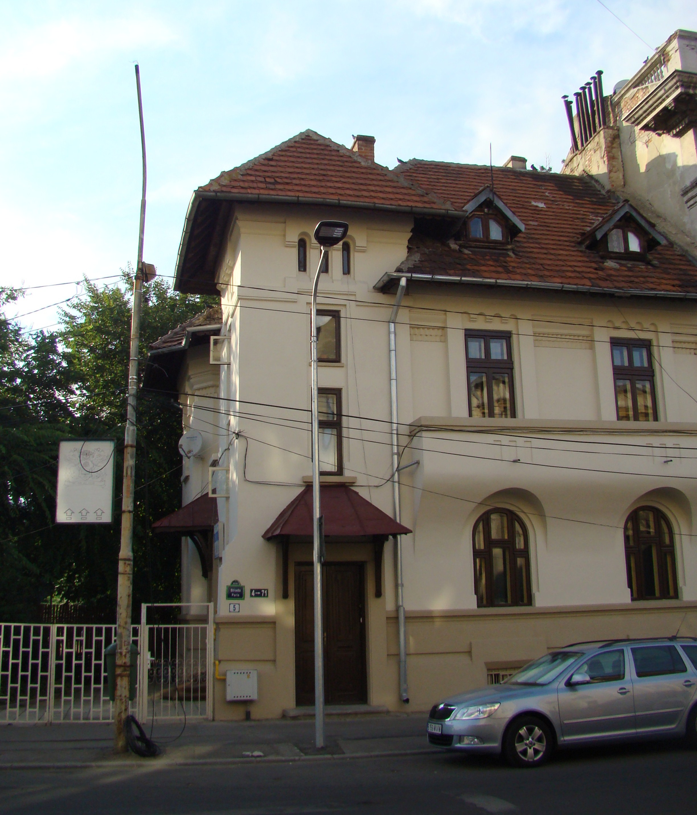 Clădire monument istoric, str. Paris, nr.5